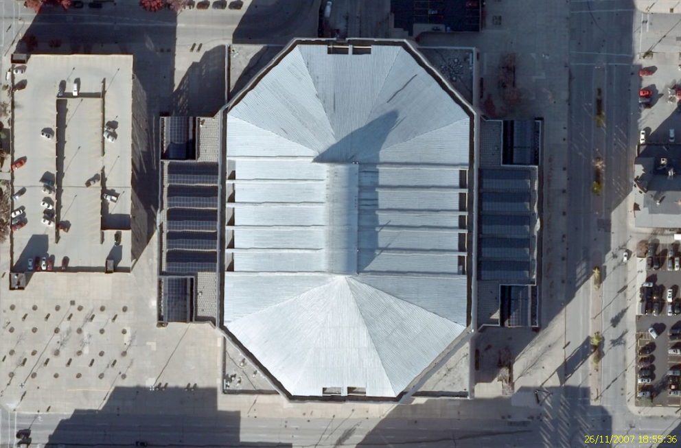 Image satellite du Bradley Center de Milwaukee, Wisconsin. Image satellite USGS de Nasa World Wind